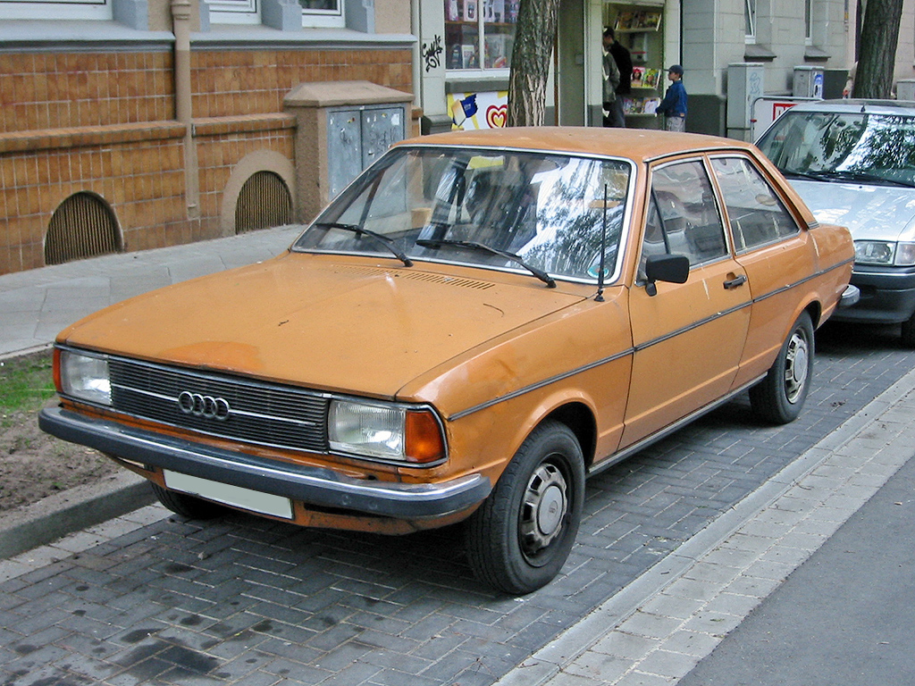 Audi 80 (B1) Facelift